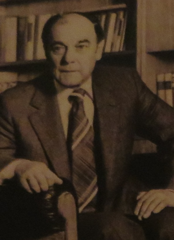 Jozef Mistrík